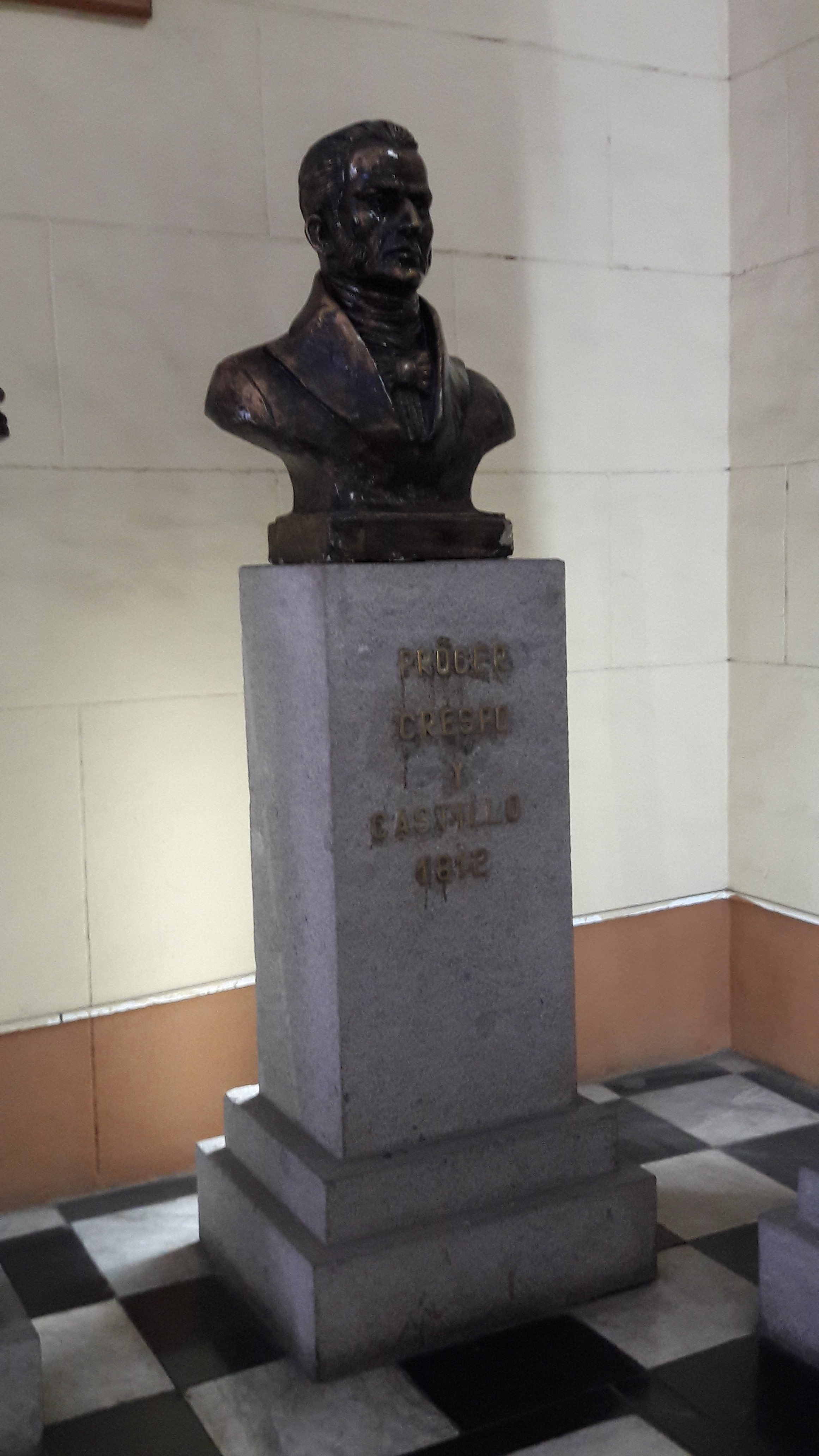 Prócer Crespo y Castillo 1812